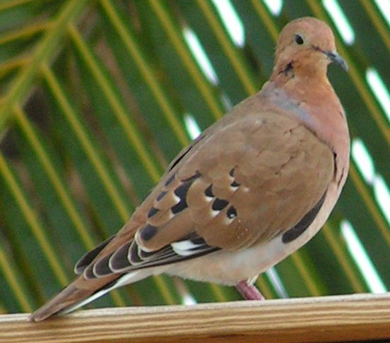 Zenaida aurita, photographed on Barbados